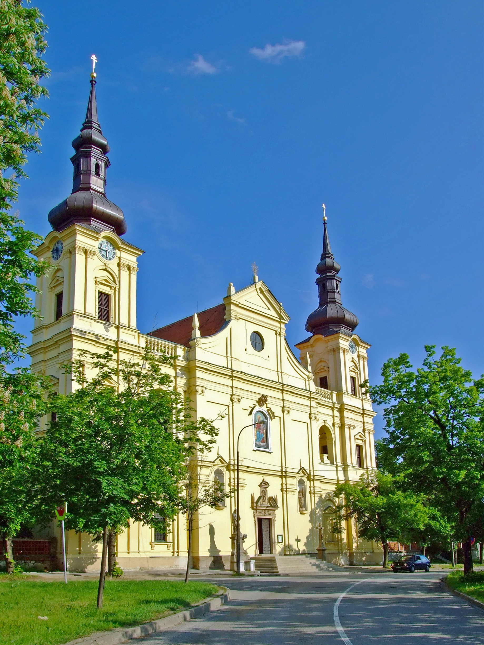 Tuřany - chrám Matky Boží